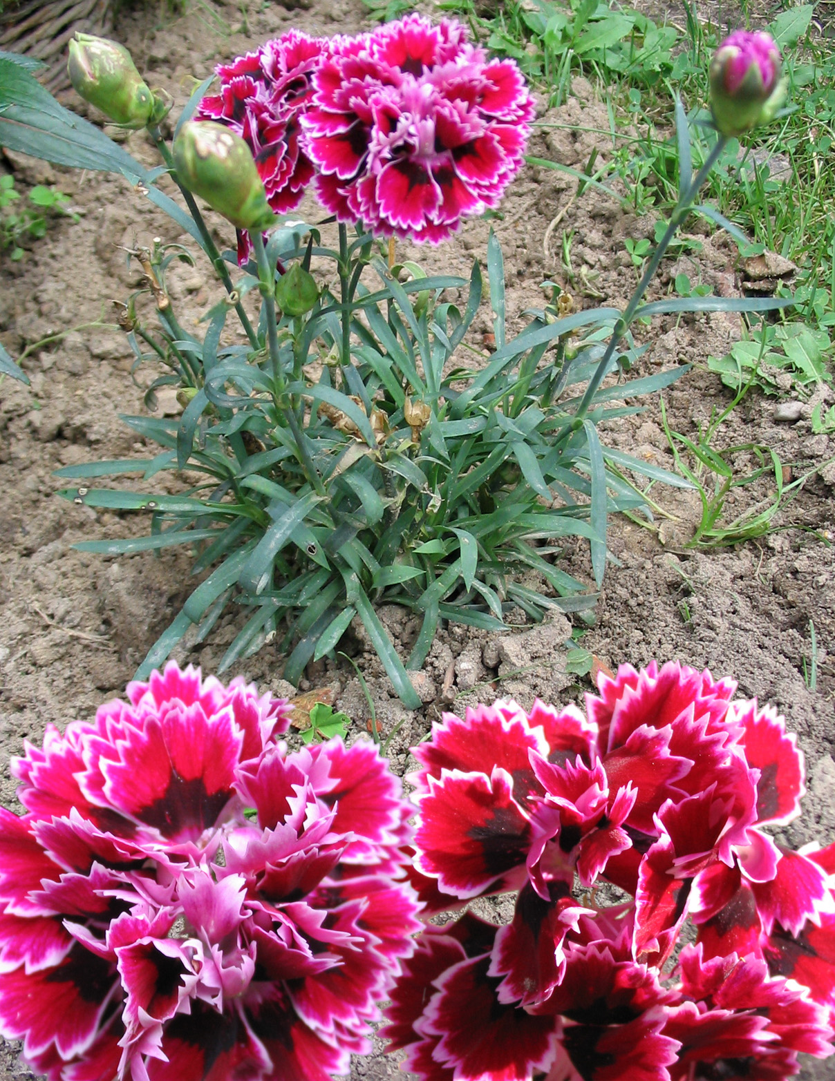 Beschreibung: Gartennelke (Dianthus caryophyllus) Fotograf/Bearbeitung: Darkone, 17./31. August / 18. September 2004